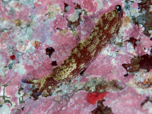 Elysia amakusana, a 9 m, Parque Marino de Izu, Japón